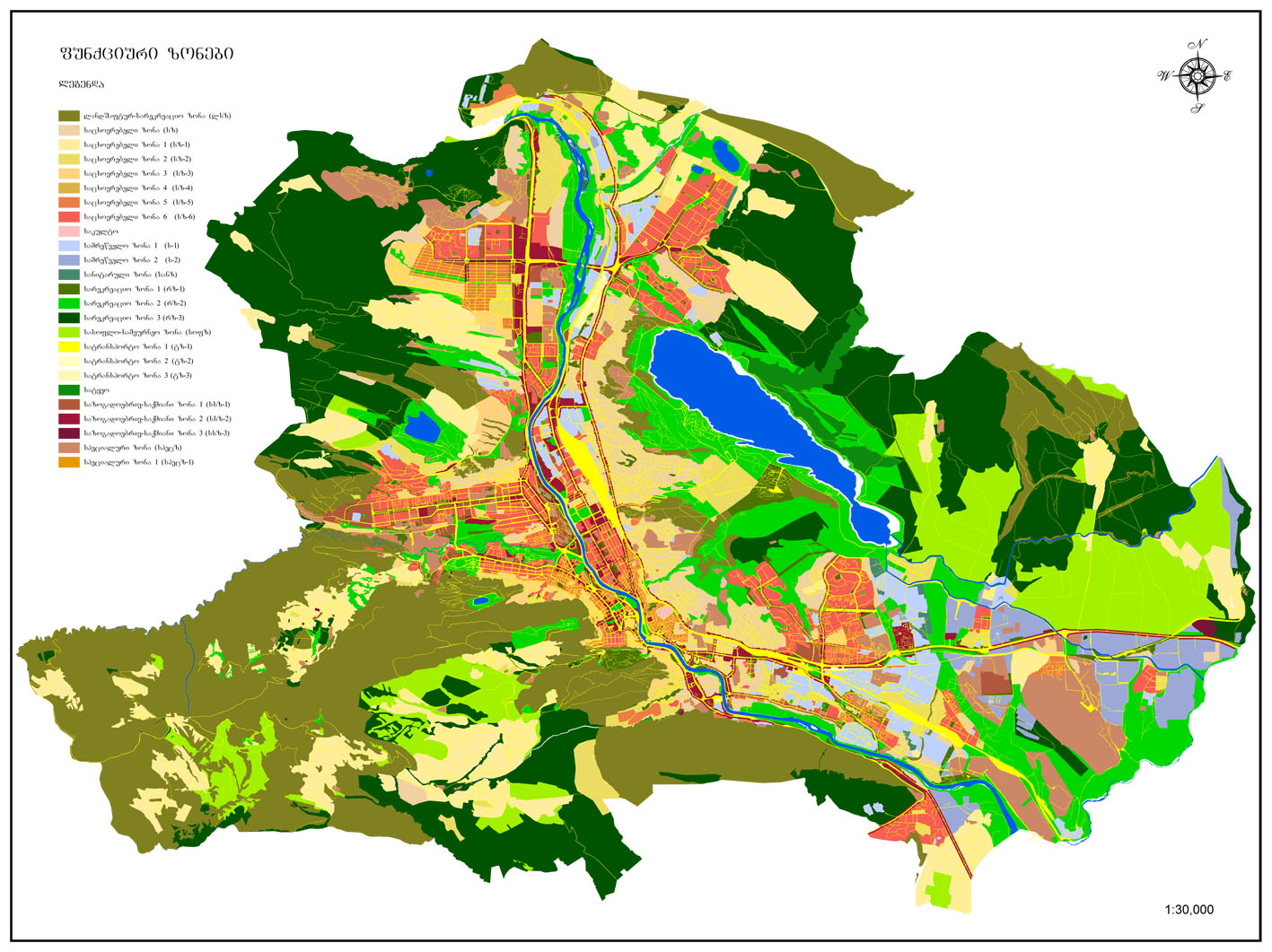 დედაქალაქის პერსპექტიული განვითარების გენერალური (მიწათსარგებლობის) გეგმა. მიღბულია ქ. თბილისის საკრებულოს მიერ, 2009 წლის 5 ივნისს. მიმდინარე ცვლილება - 2011 წლის 30 სექტემბერი.